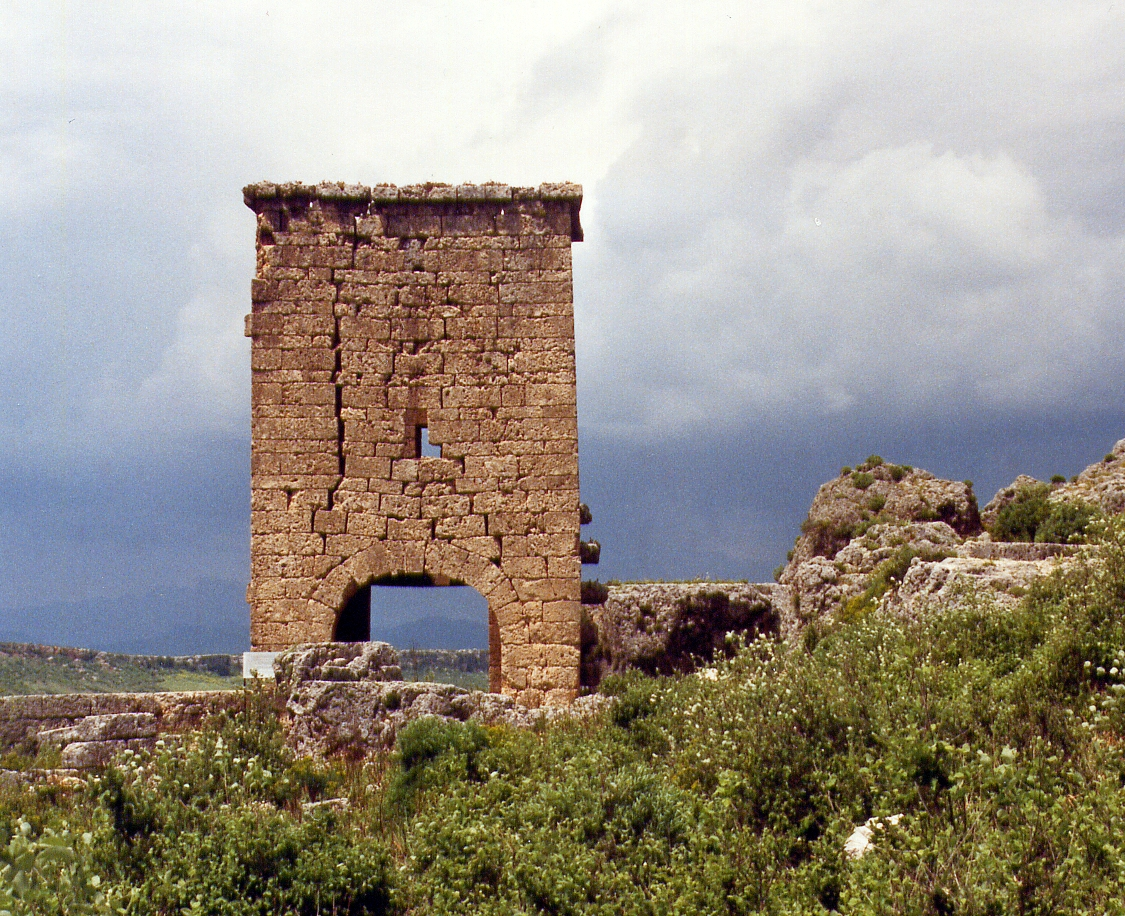 Stadttor in Sillyon, Südtürkei